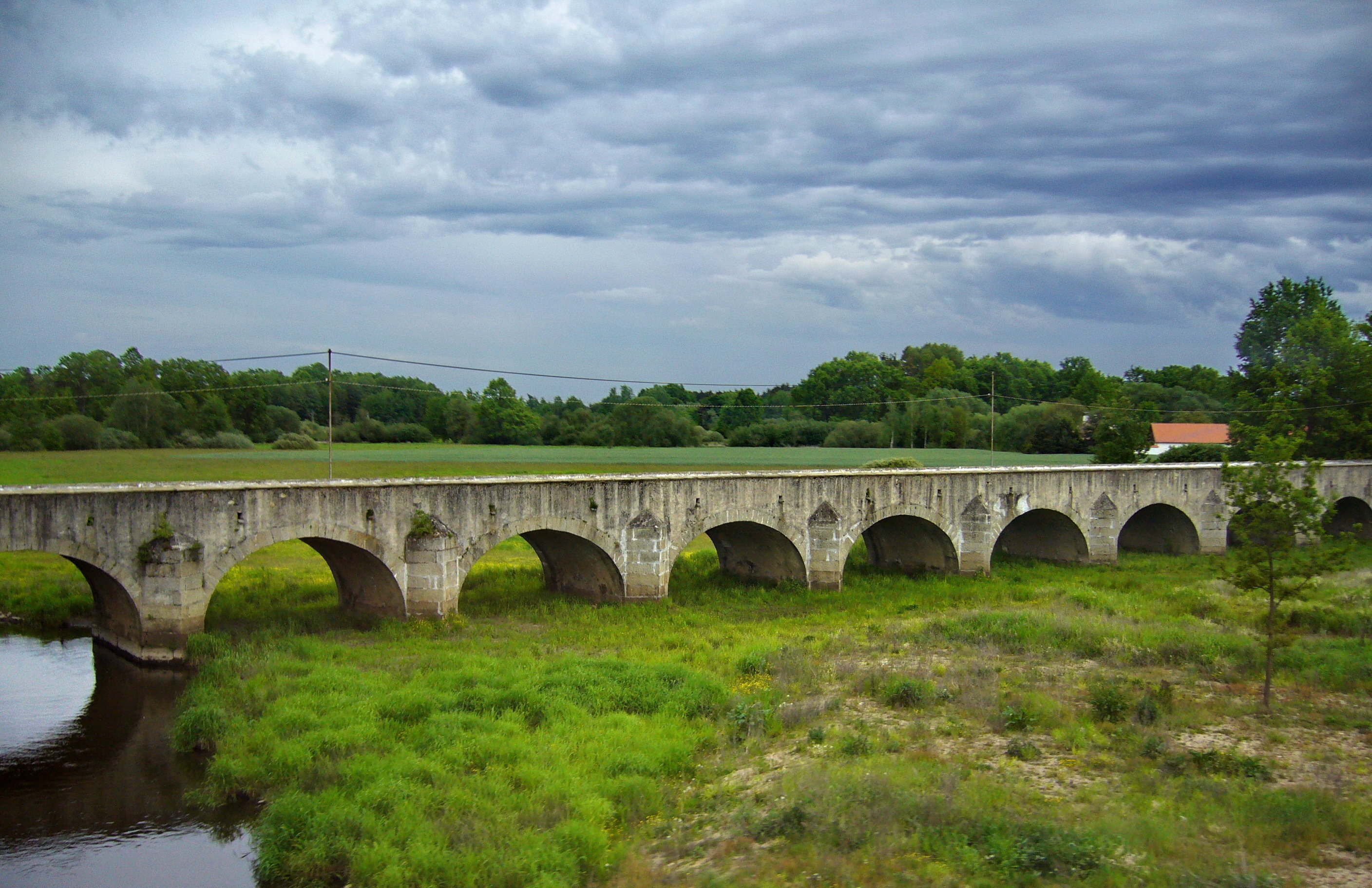 Телч, Чешская Республика